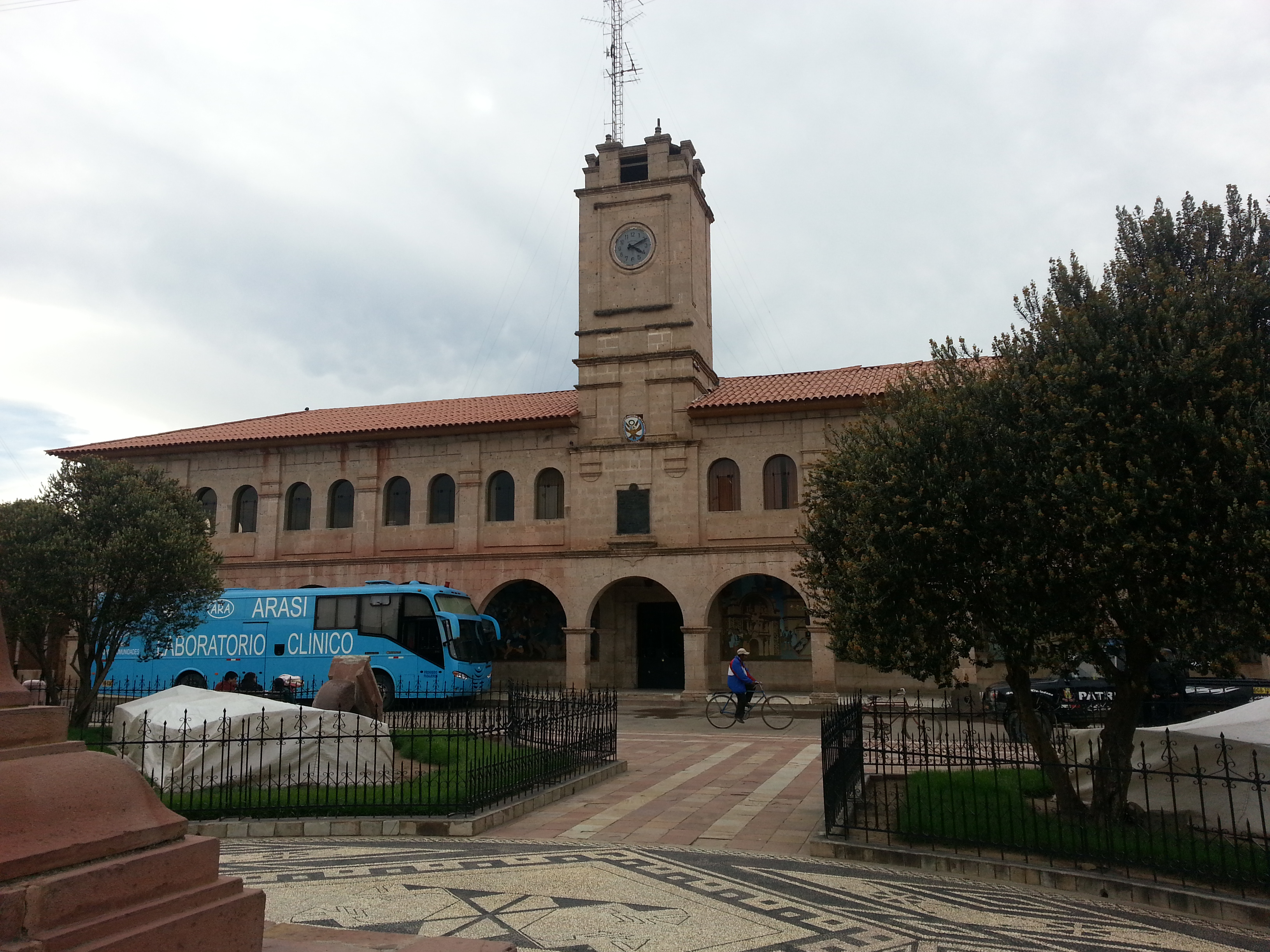 Municipalidad de Lampa, Puno, Perú